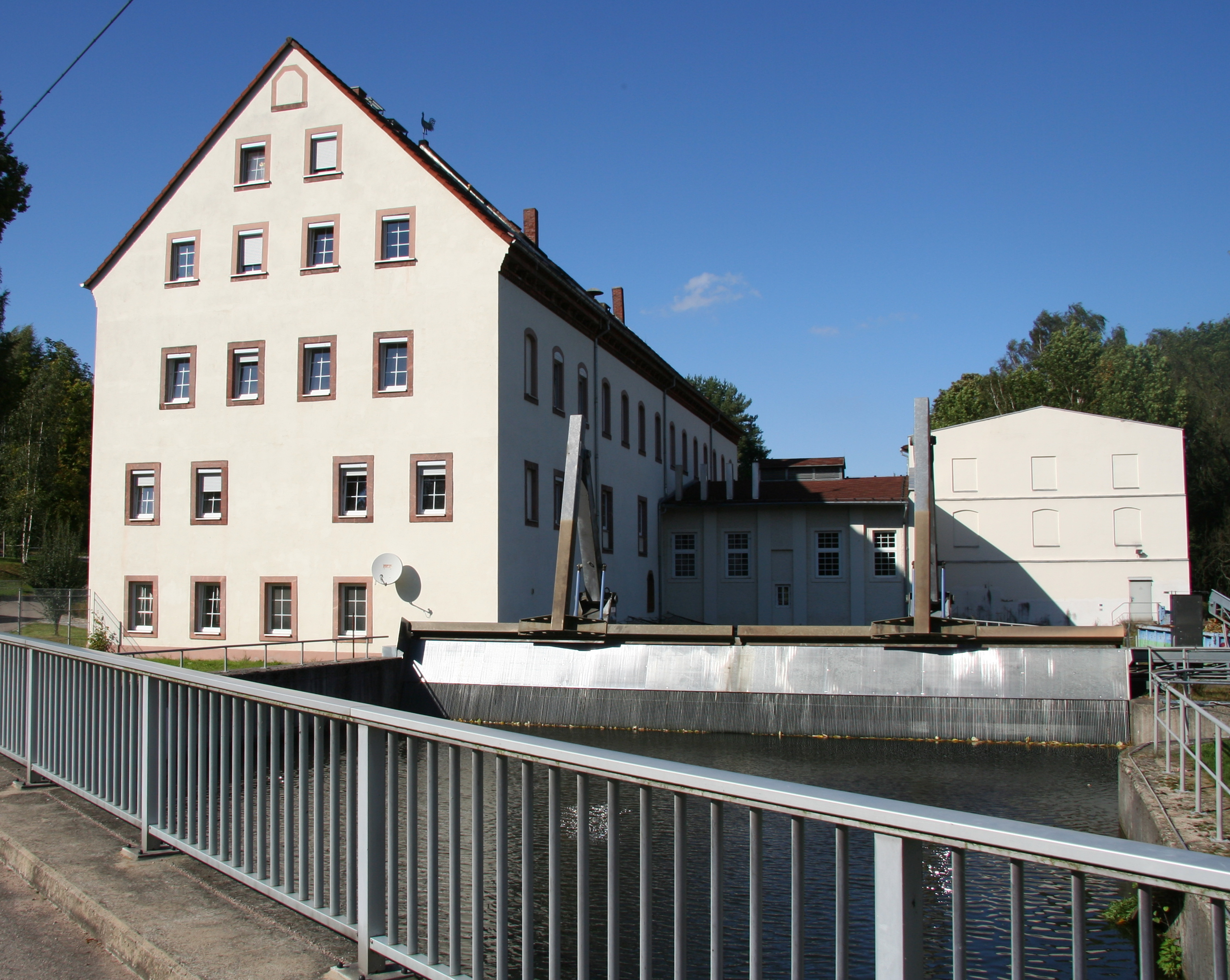 Alte Mühle im Ortsteil Thierbach der Stadt Penig Ansicht aus Richtung Zwickauer Mulde